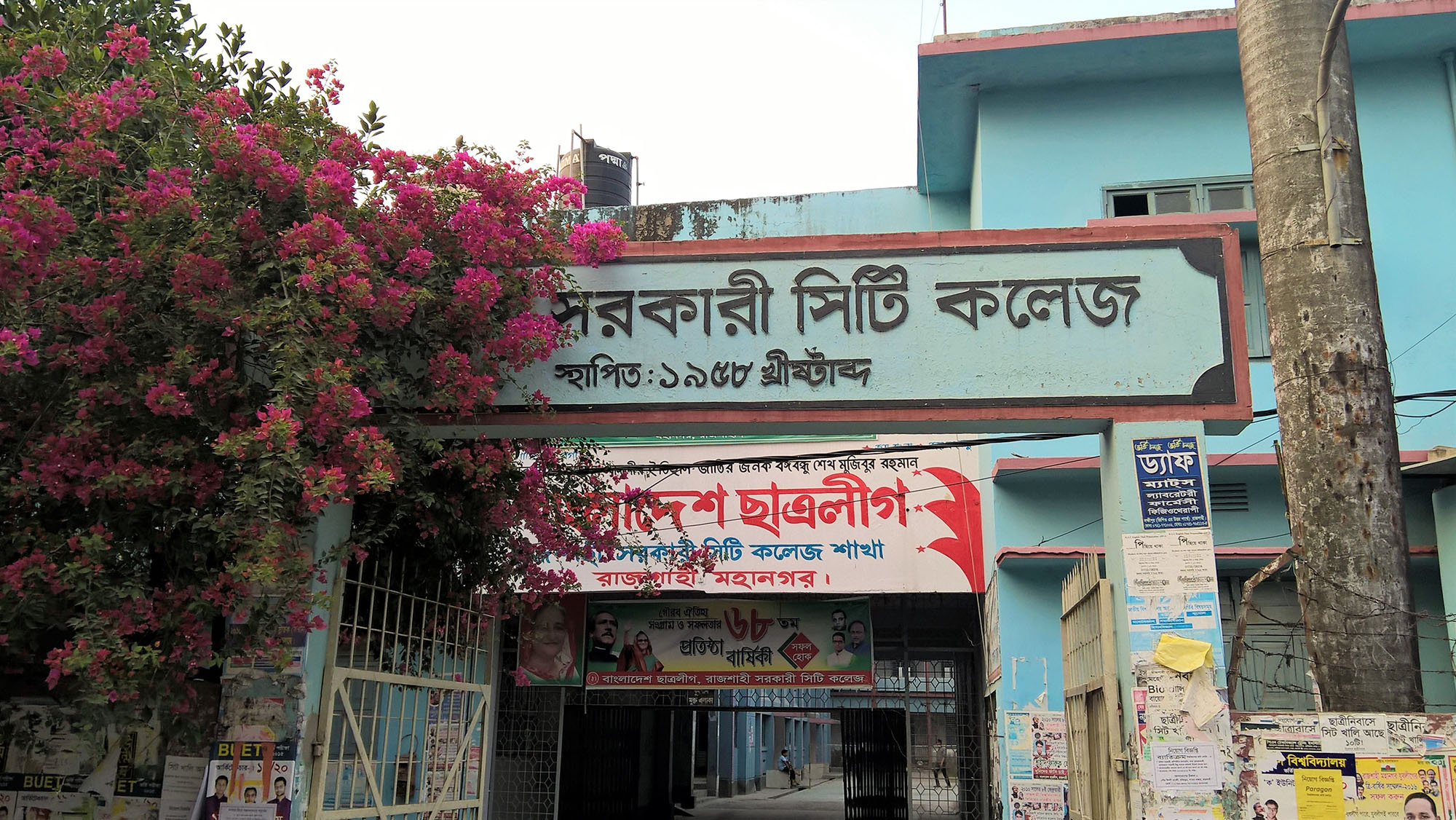 রাজশাহী সরকারি সিটি কলেজ রাজশাহী শহরের রাজারহাতা এলাকায় অবস্থিত একটি সরকারী কলেজ। এটি ১৯৫৮ সালে প্রতিষ্ঠিত হয় এবং জাতীয়করণ করা হয় ১৯৮২ সালে।